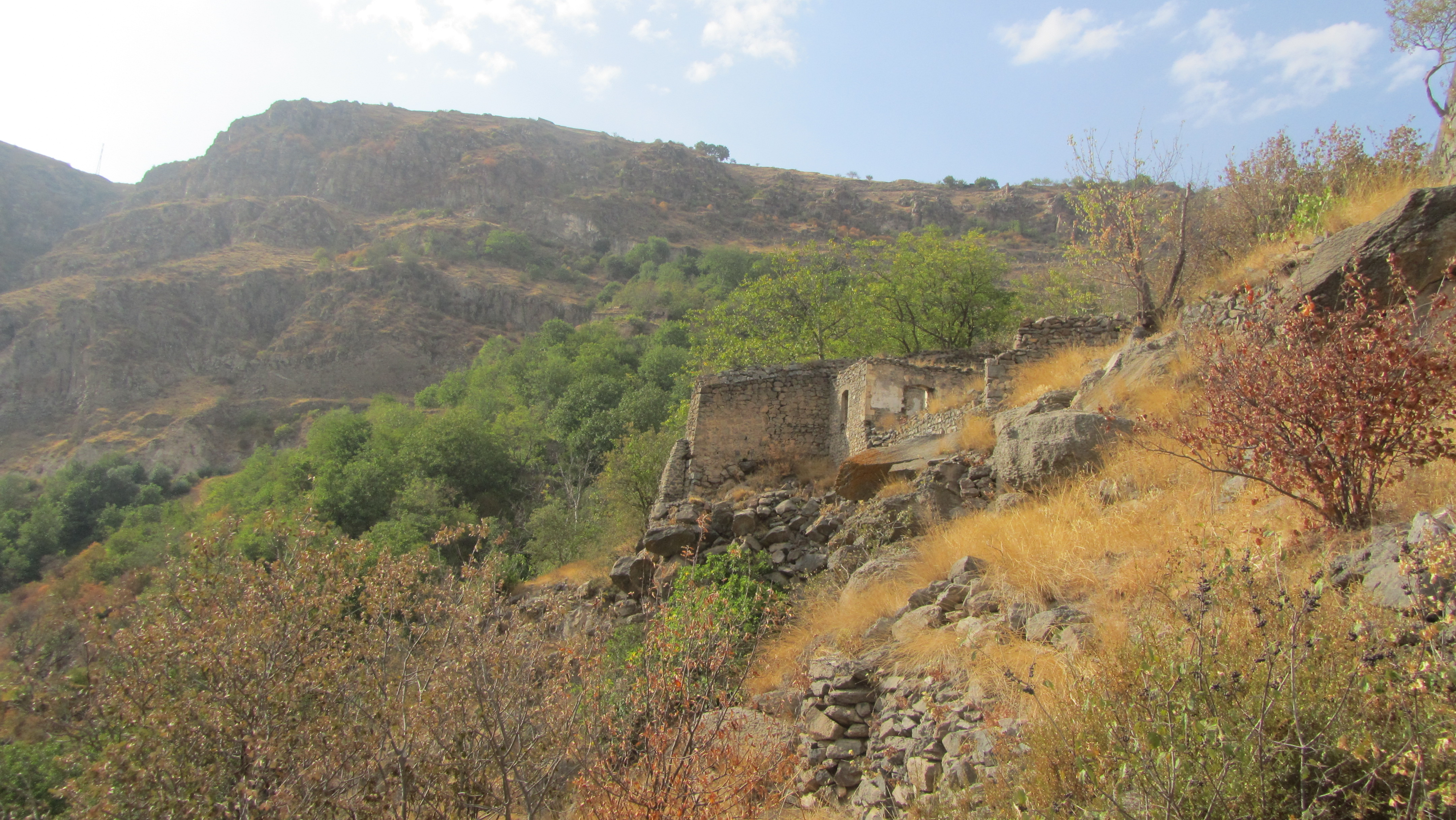 Շինուհայրի Կուսանաց Անապատ 73/2.3